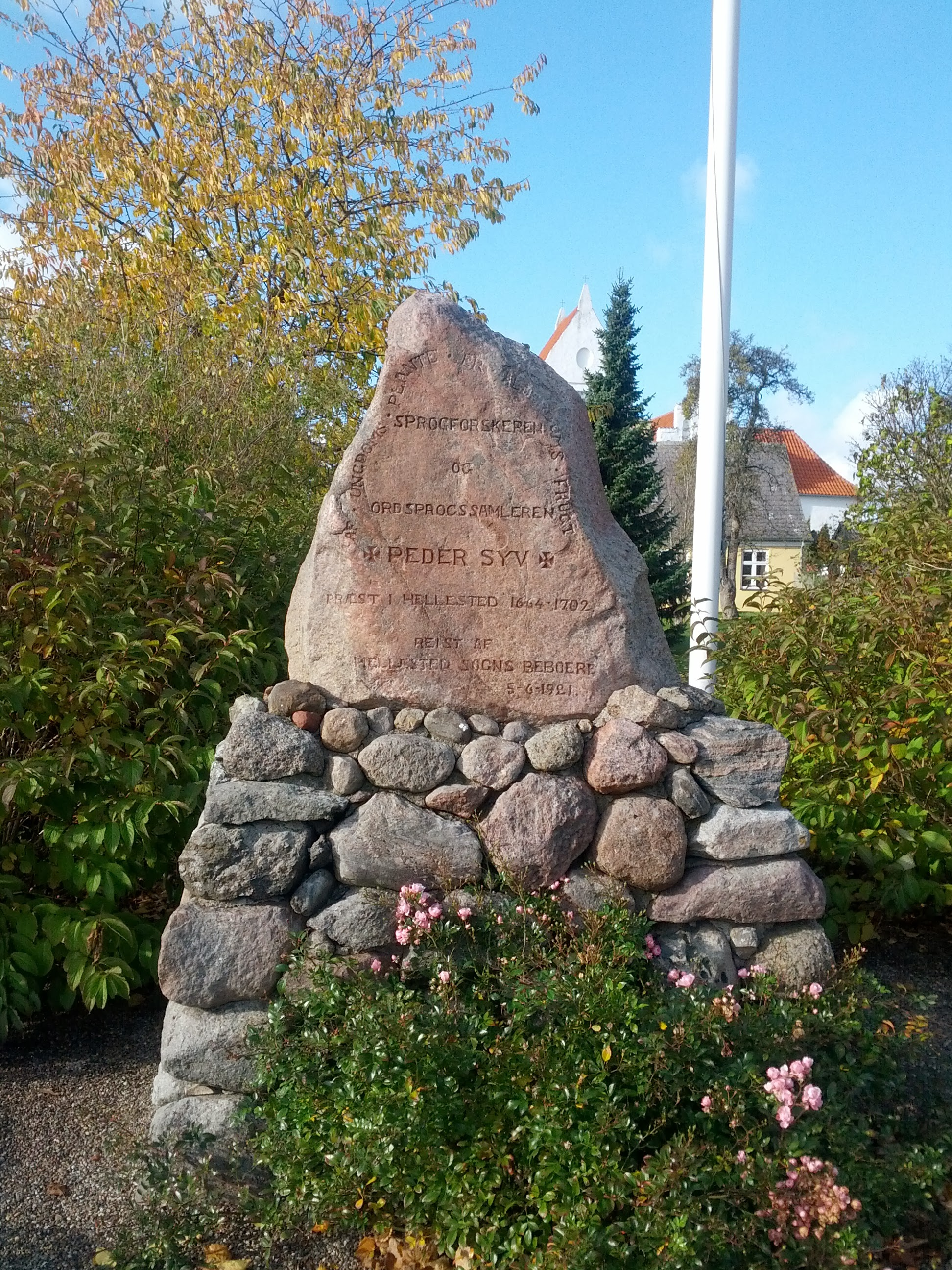 Mindesten sat for peder Syv i 1921